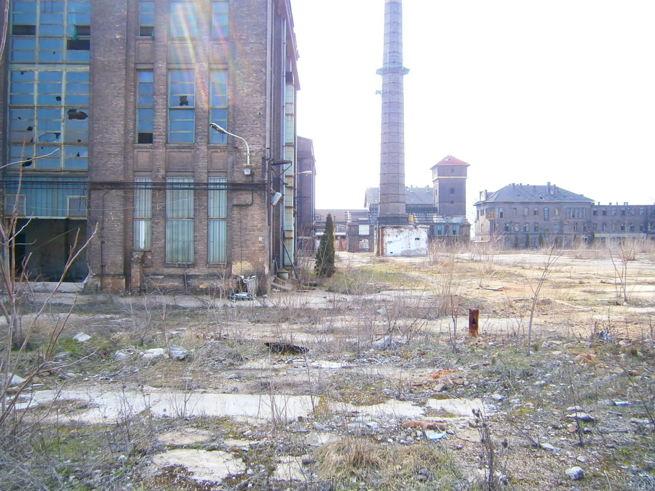 Budapesti FÉG épületei.